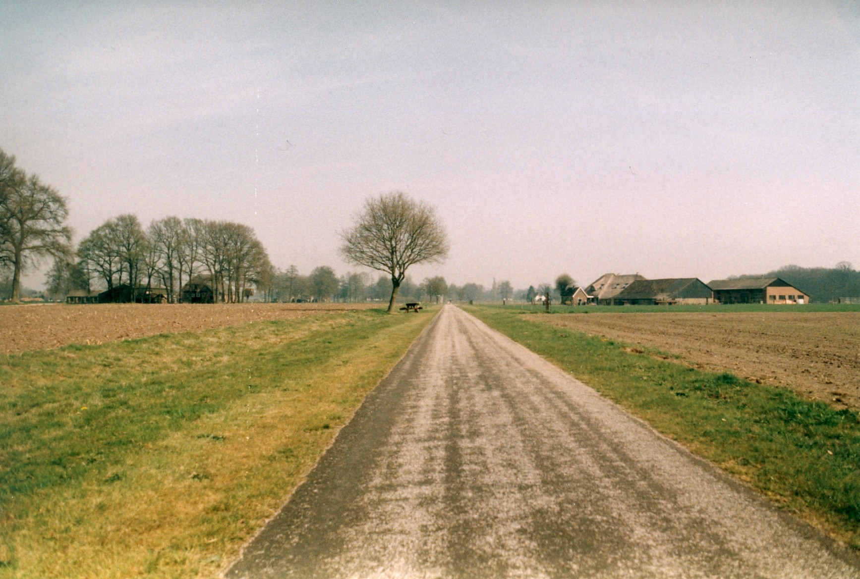 voormalige spoorlijn Apeldoorn - Zwolle bij Emst